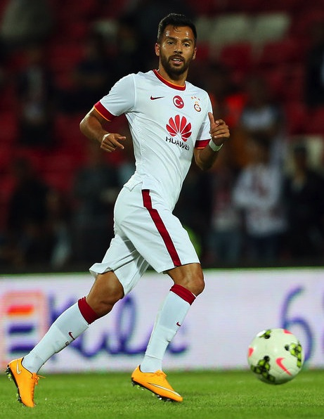 Yasin Öztekin Balıkesirspor maçında bek mevkiinde oynadı.